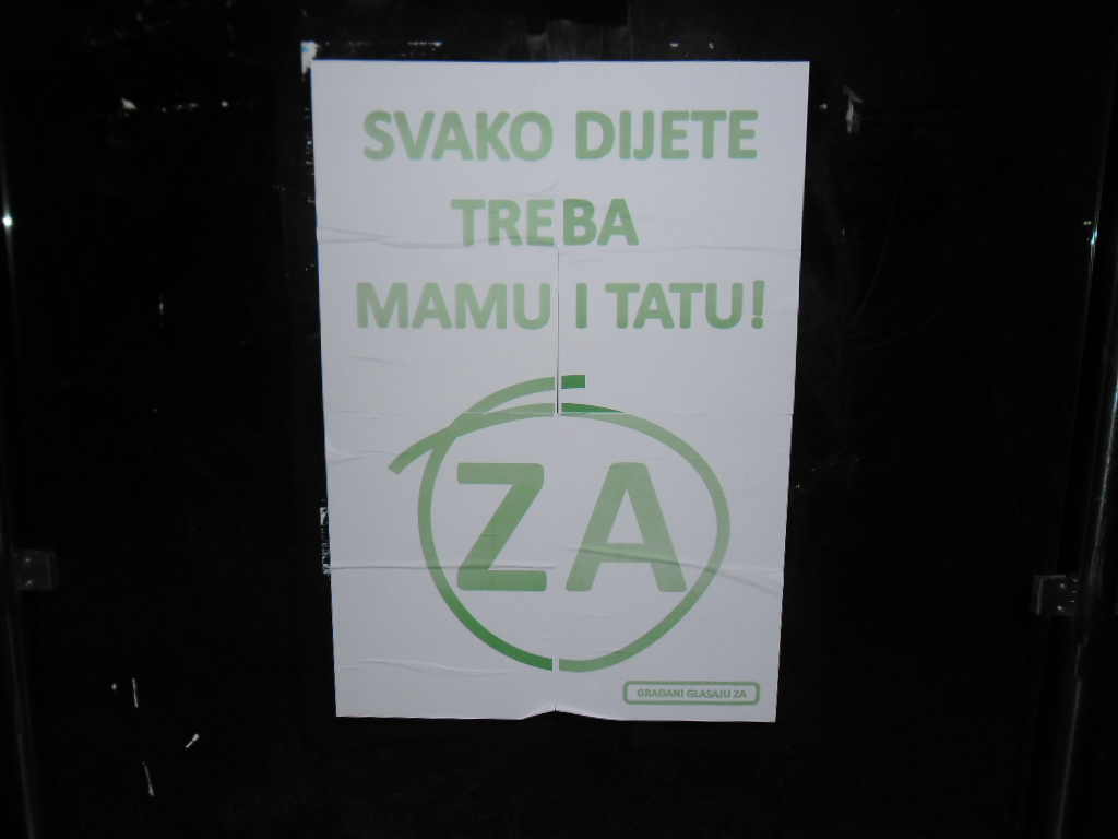 plakat inicijative U ime obitelji u Rožatu, 1. prosinca 2013.